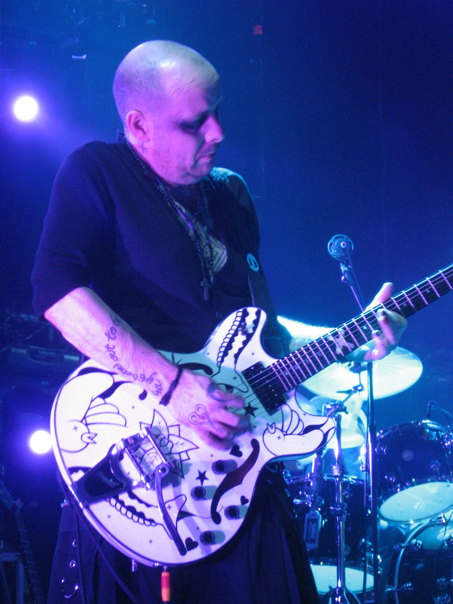 ARTISTS: Daliesque and Pearl